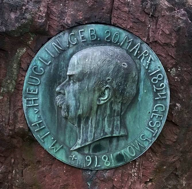 Medaillon am Grab des Afrikaforschers Theodor von Heuglin auf dem Pragfriedhof in Stuttgart